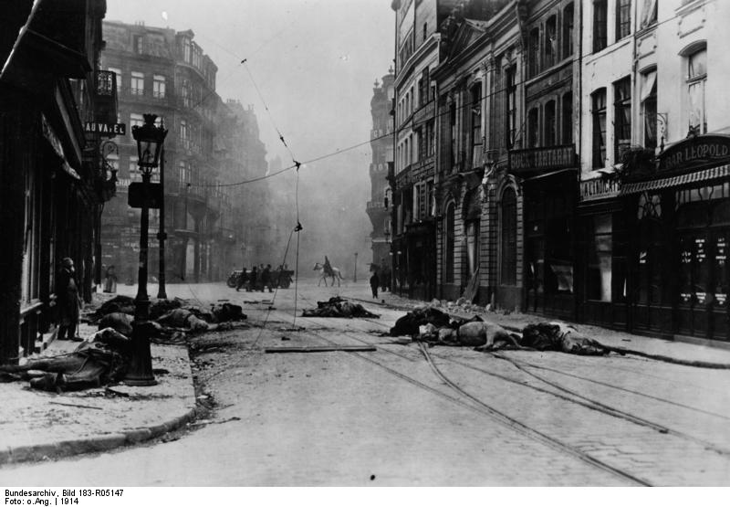 Frankreich, Lille, nach Kämpfen ADN-ZB/Archiv/ I. Weltkrieg 1914 - 1918 Westeuropäischer Kriegsschauplatz: 1914. Eine Straße in Lille nach einem Kampf. 28041-14